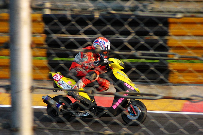 澳門格蘭披治大賽車綿羊仔賽。